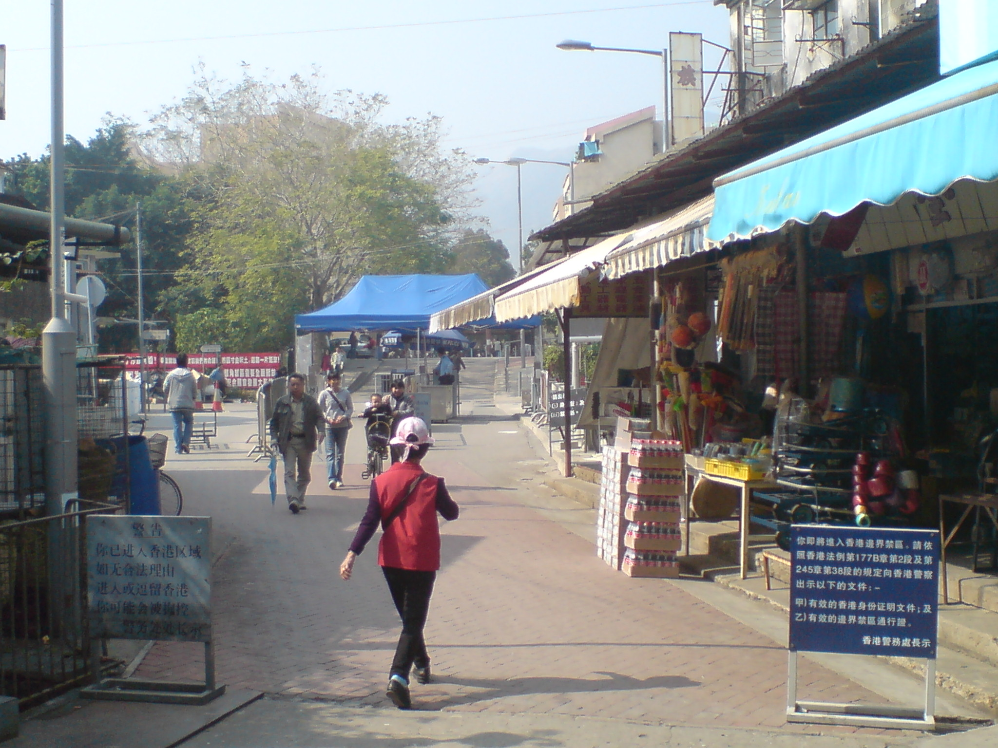 中文（香港）: 中英街深圳與香港的邊界，可以看到有香港方面在邊界放的一個針對香港居民的繁體中文警示牌和針對內地遊客的簡體中文警示牌。